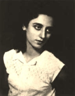 صُورة لِلسَّيِّدَة فَيرُوز في العام ١٩٤٦م